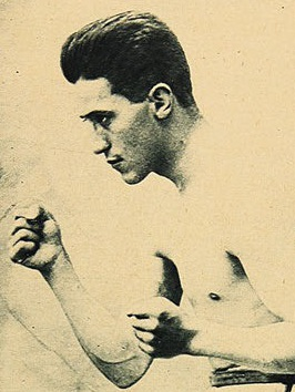 Enrique Giaverini, boxeador chileno